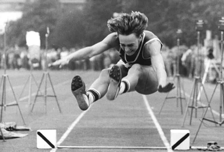 Heike Drechsler ADN-ZB Koard 22.9.85 Berlin: Leichtathletik-Sportfest. Weitsprung-Weltmeisterin Heike Drechsler vom SC Motor Jena errang mit einem Sprung von 7,44 m den Weltrekord in ihrer Disziplin. Sie erreichte diese Leistung beim Wettbewerb der besten DDR-Leichtathleten im Berliner Sportforum (siehe 15N)